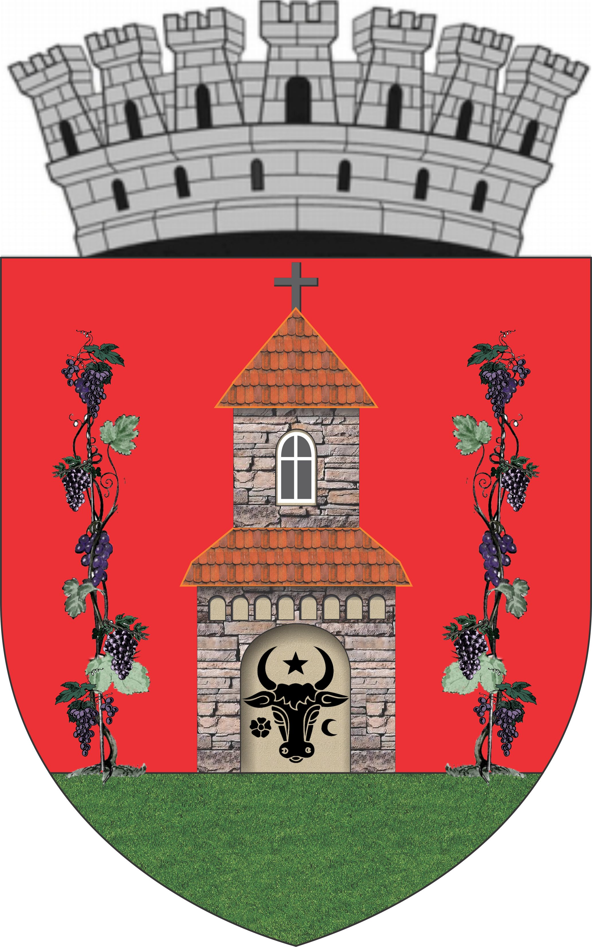 Sugestie Stema Husi